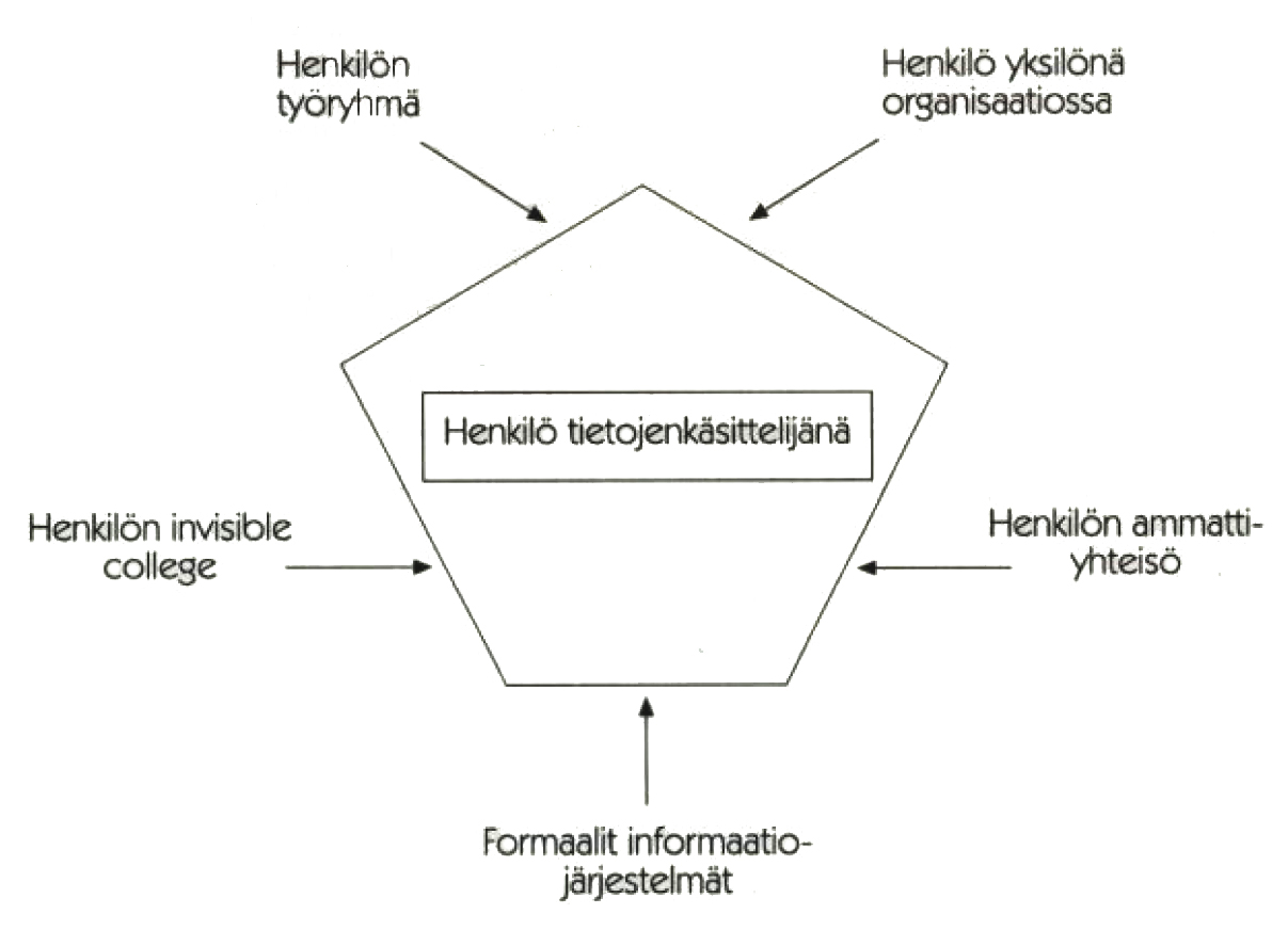 Allenin malli